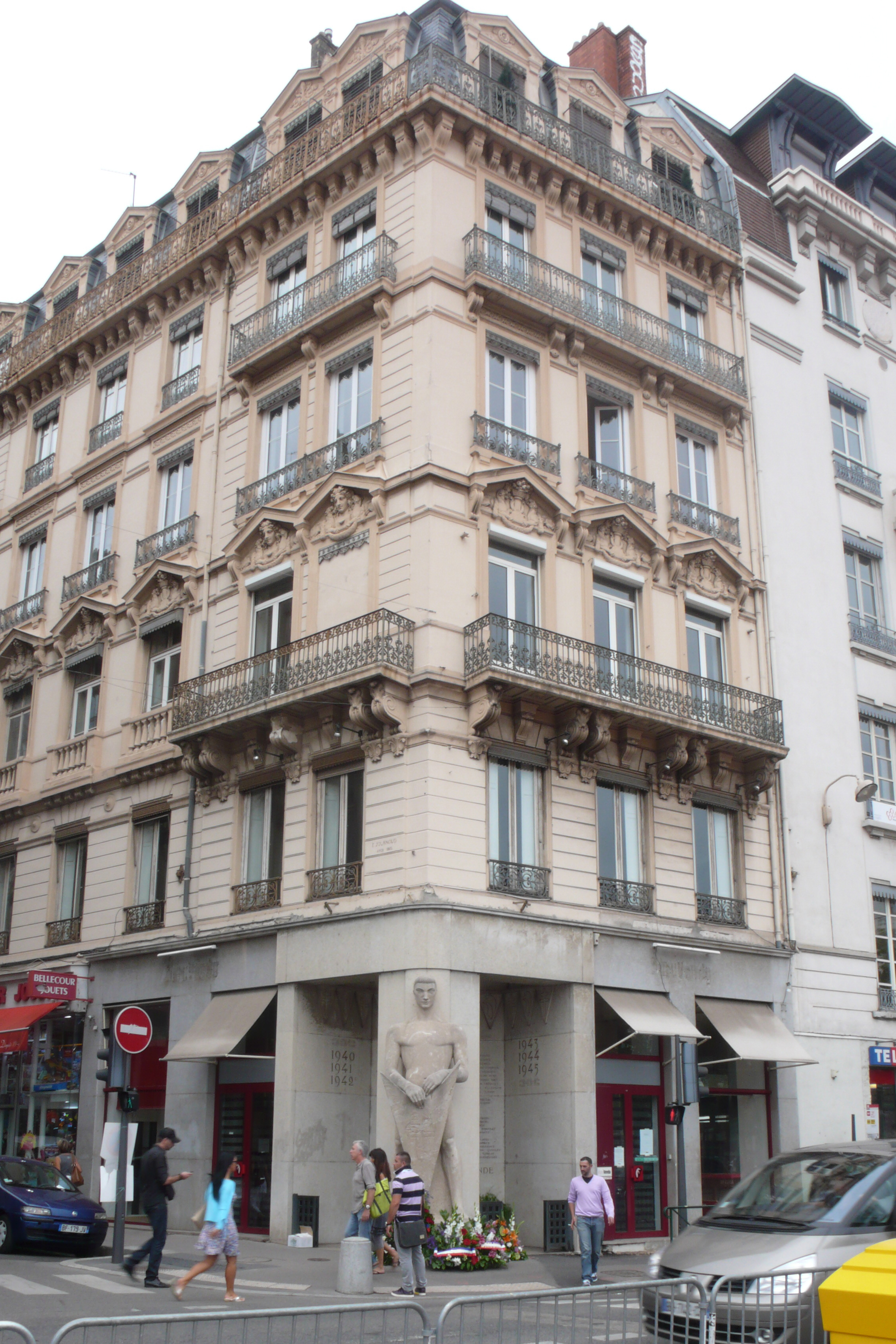 Monument à la Résistance et à la Déportation, dit "Le Veilleur de pierre" (F-69002, Lyon)